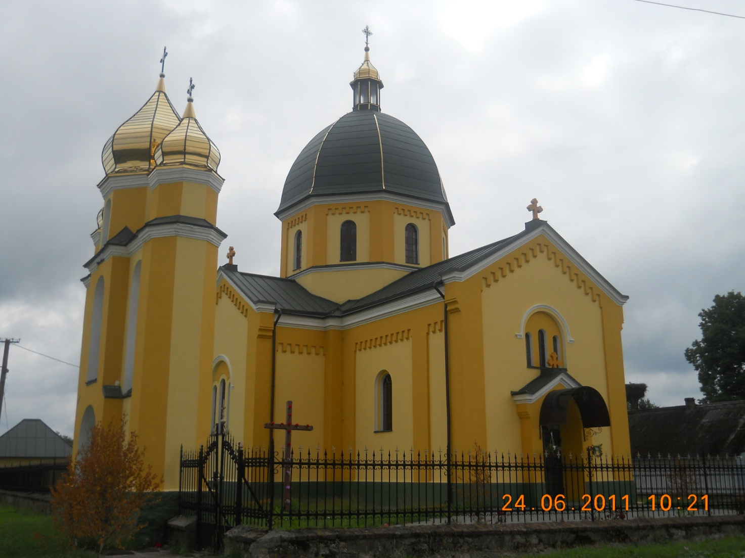 Церква ім. Присвятої Богородиці (Покрова)